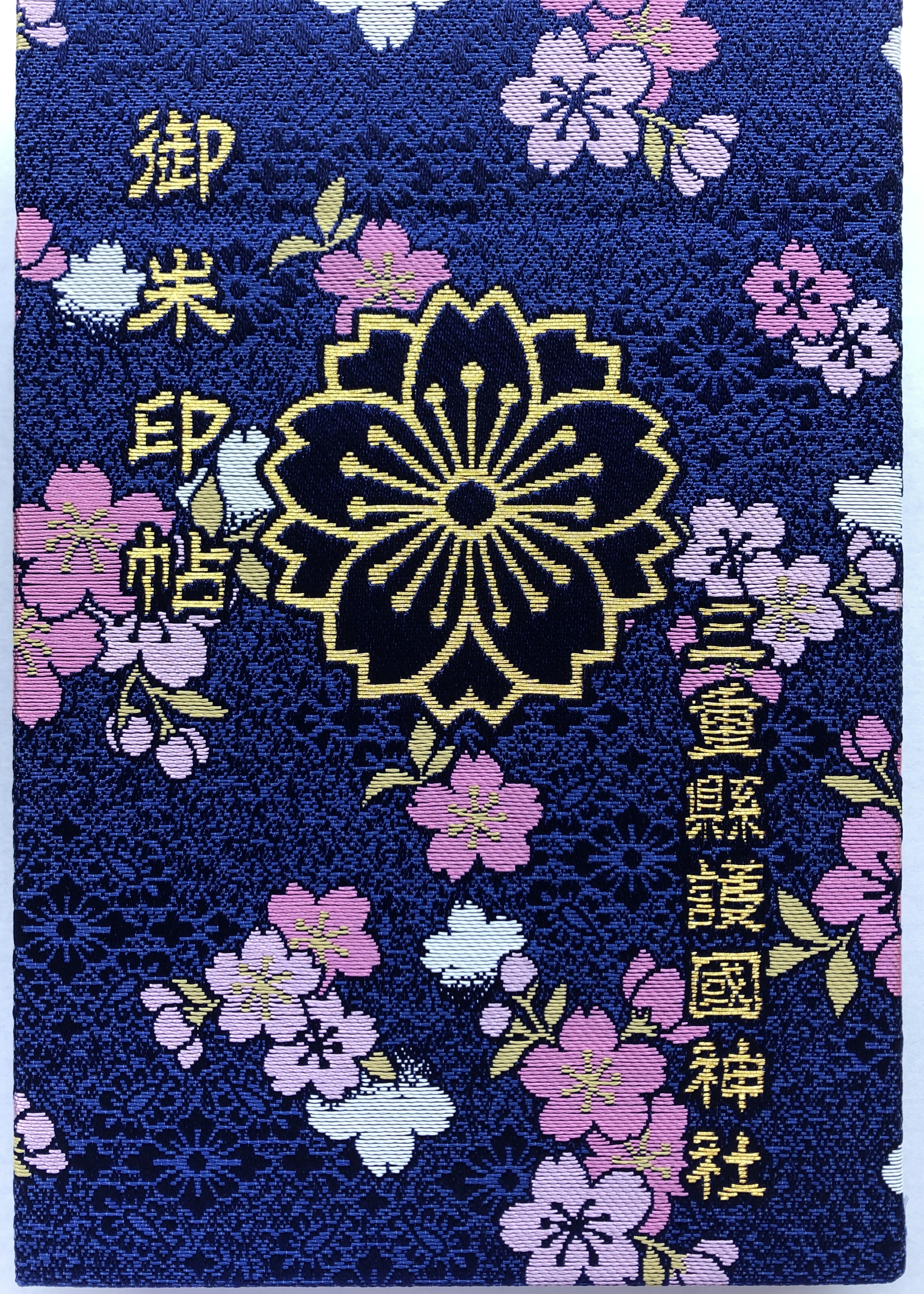 三重県護国神社御朱印帳